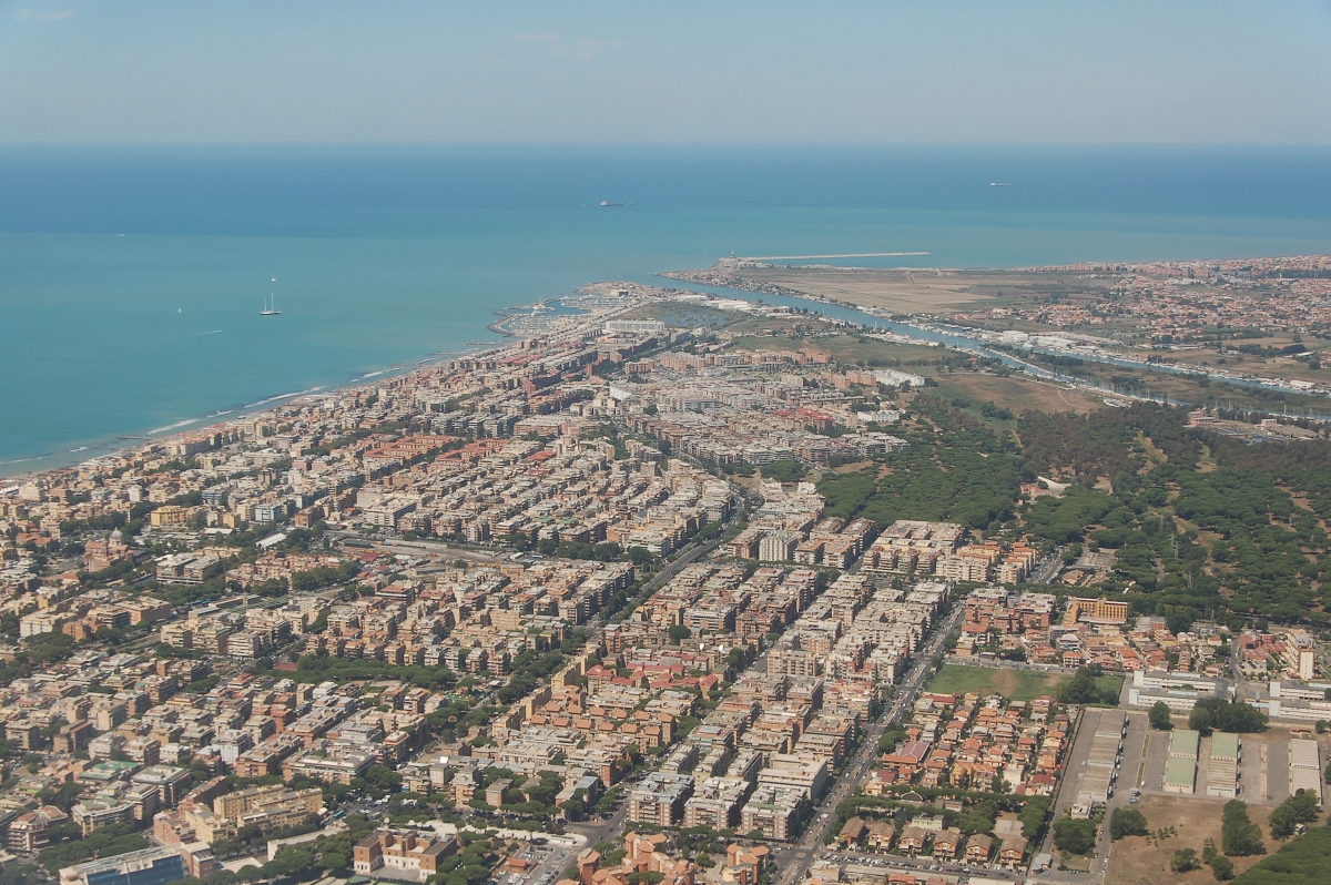 Ostia 2011 Durch die Übernahme der UMTS Kosten durch den gemeinnützigen Vereins Skillshare.eu konnte dieses Bild bereitstellen werden. Skillshare e.V. ist ein eingetragener gemeinnütziger Verein zur Förderung der Bildung durch Unterstützung der Erstellung, Sammlung und Verbreitung so genannten freien Wissens. IBAN: DE16 8306 5408 0004 8850 66 BIC: GENODEF1SLR Bank: VR-Bank Altenburger Land